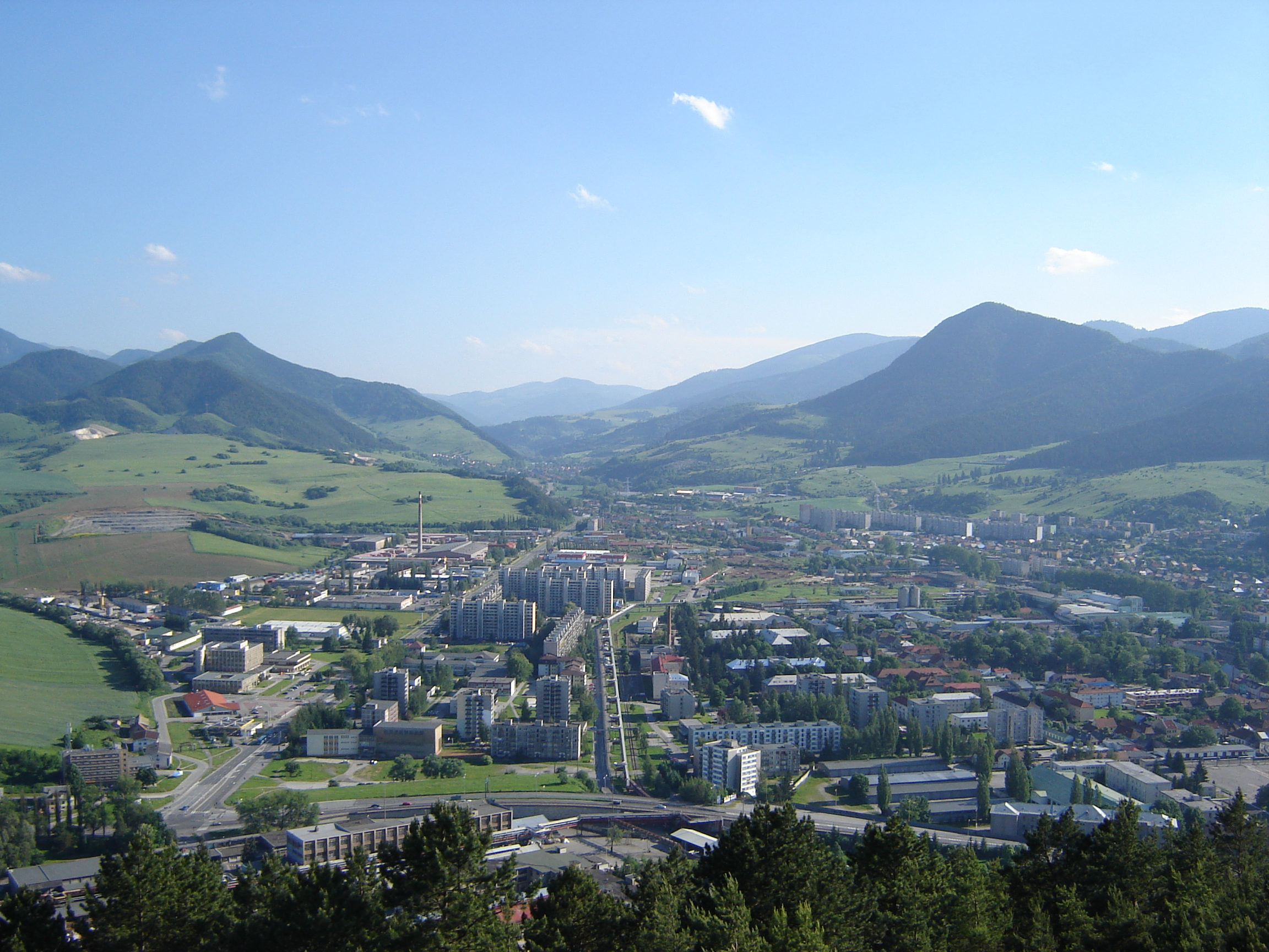 Wiew to ruzomberok